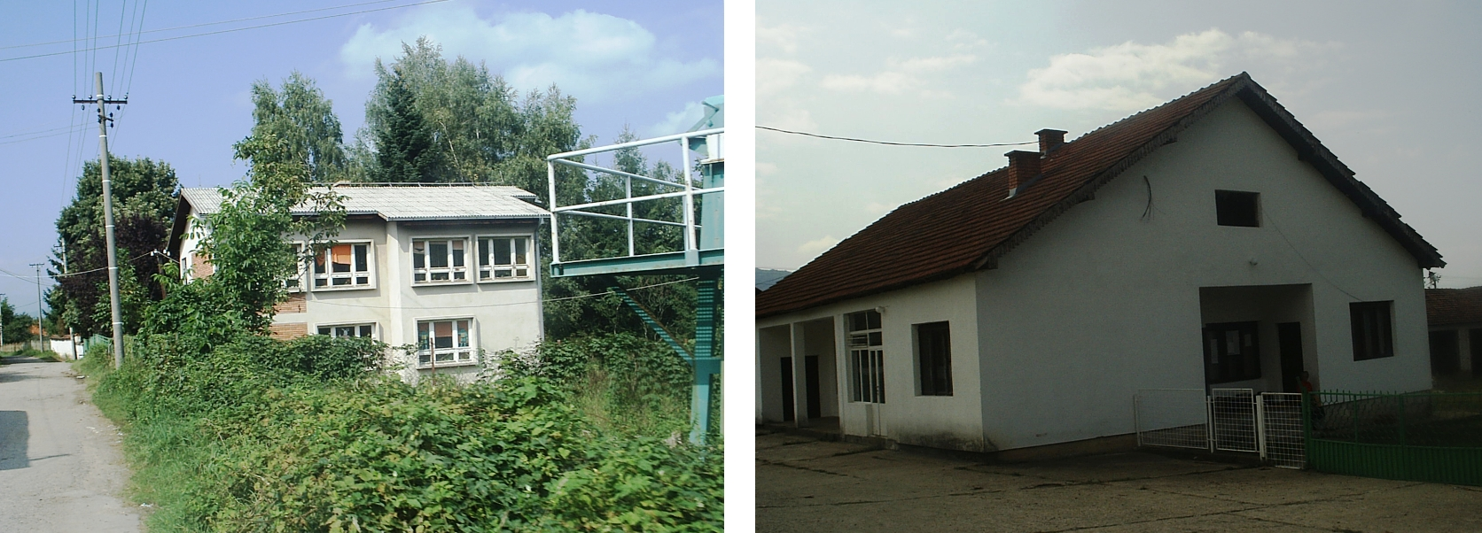 Масурица (основна школа и сеоски дом).